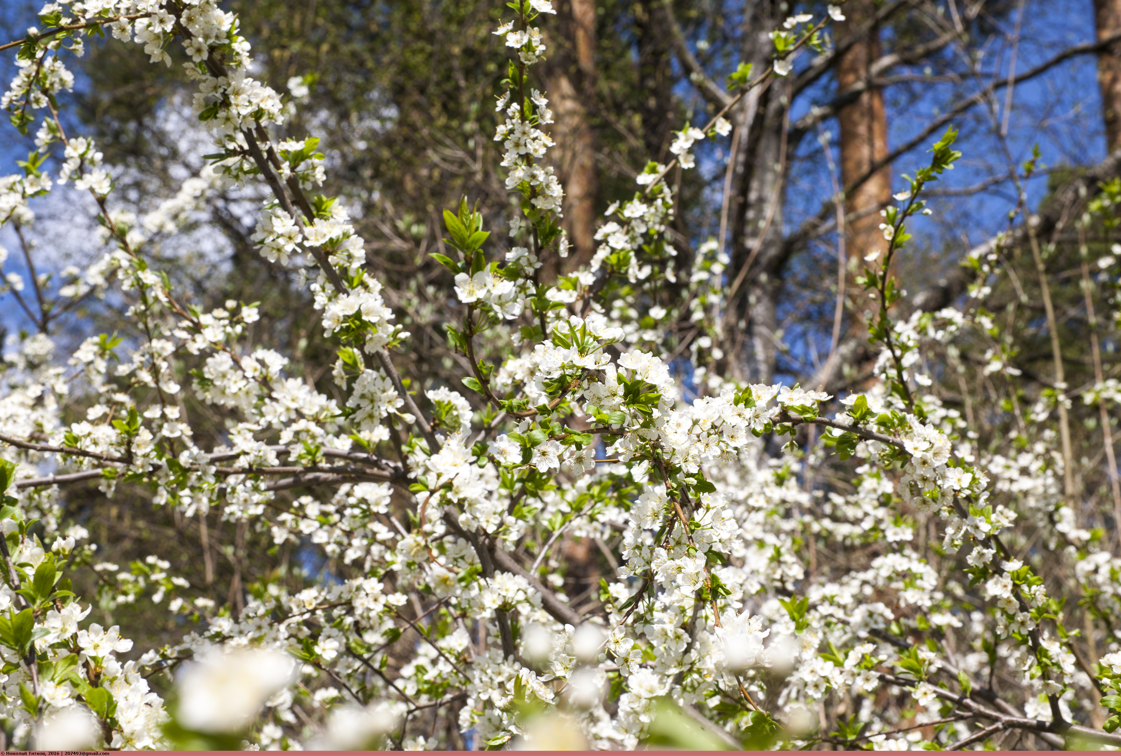 Расцветающая уссурийская слива (Prunus ussuriensis). Слива — род растений семейства Розовые (Rosaceae). Включает около 250 видов, распространённых, главным образом, в северных умеренных областях земного шара.